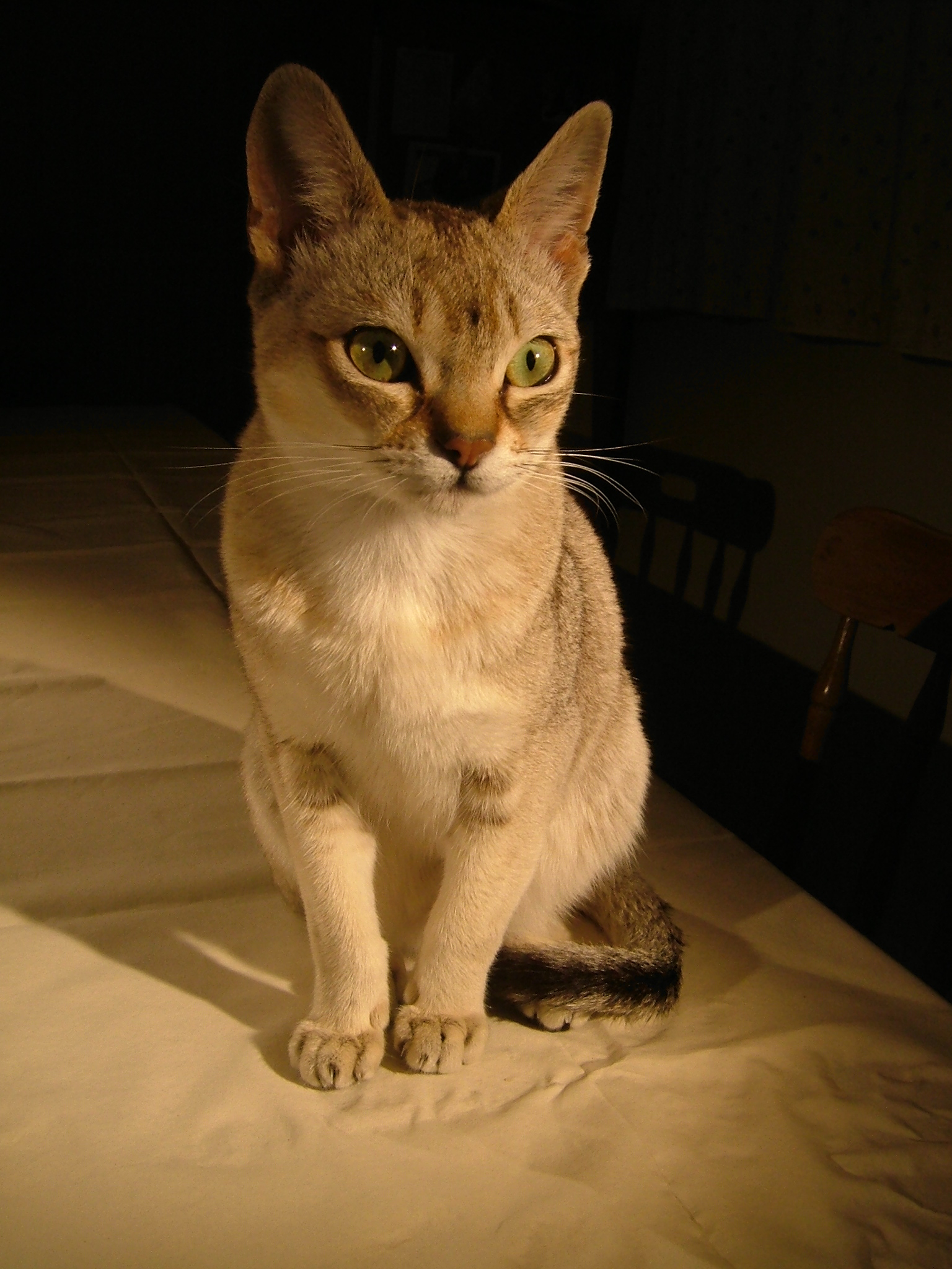 Liz Upton, - share-alike